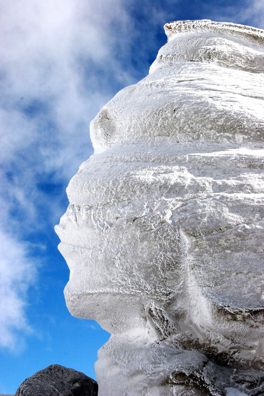 Bucegi Sphinx, RomaniaBusteni Trekking 20